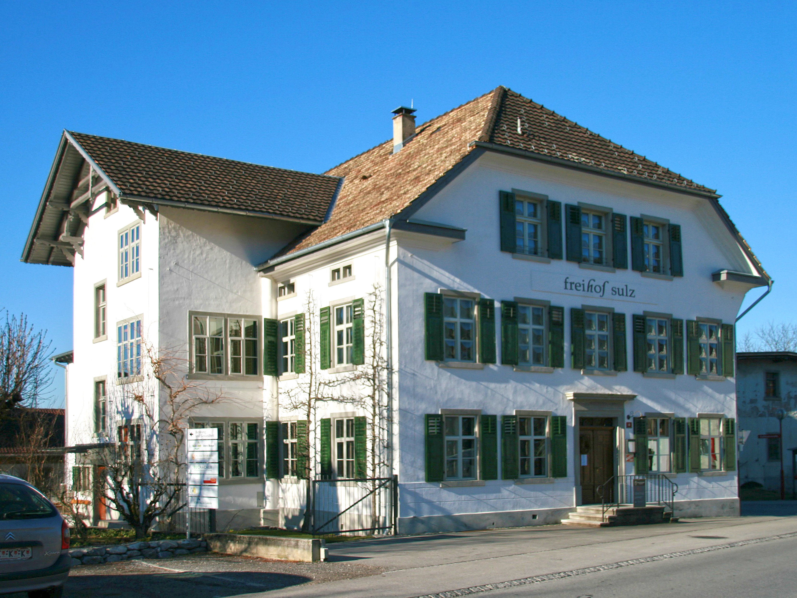 der Freihof Sulz, 1796 erstmals urkundlich erwähnt, in der Schützenstrasse Nr.14 in Sulz. *** Eine Malerei des Künstlers Florus Scheel aus dem Jahre 1896 spiegelt im so genannten "ägyptischen Zimmer" die Sehnsucht nach fernen Ländern der damaligen Zeit wider. *** 1914 erwirbt Wilhelm Zettler, der Großvater der heutigen Besitzerin, das Anwesen. ***